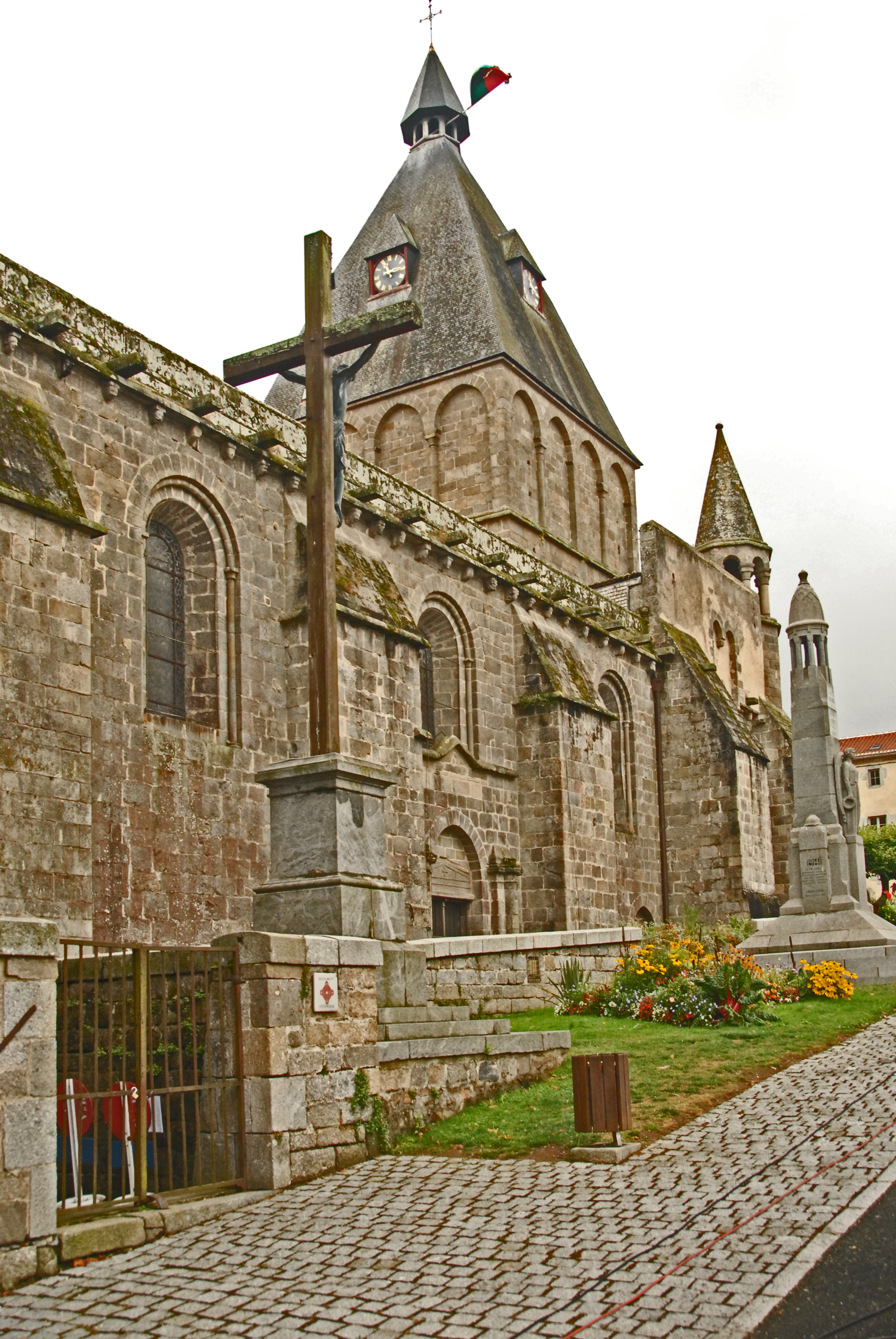 St-Pierre_de_Le_Dorat, Wehrattiken, Nordseite